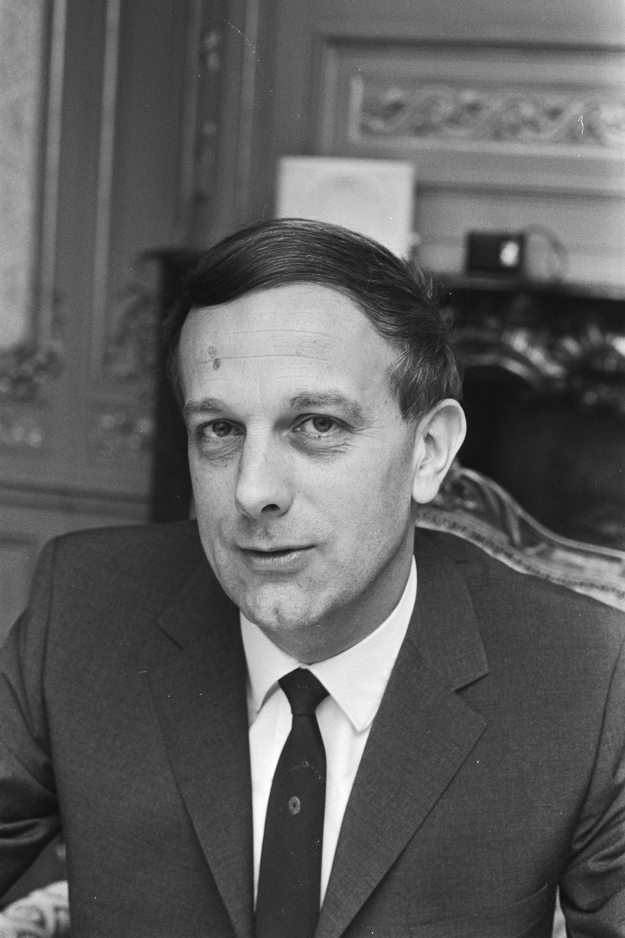 Collectie / Archief : Fotocollectie Anefo Reportage / Serie : Informateur prof. Steenkamp aan bureau in gebouw Eerste Kamer , Den Haag Beschrijving : Prof. Steenkamp Datum : 7 juni 1971 Locatie : Den Haag, Zuid-Holland Trefwoorden : hoogleraren, kabinetsformaties, politici, portretten Persoonsnaam : Steenkamp, Piet Fotograaf : Fotograaf Onbekend / Anefo, [onbekend] Auteursrechthebbende : Nationaal Archief Materiaalsoort : Negatief (zwart/wit) Nummer archiefinventaris : bekijk toegang 2.24.01.05 Bestanddeelnummer : 924-6265